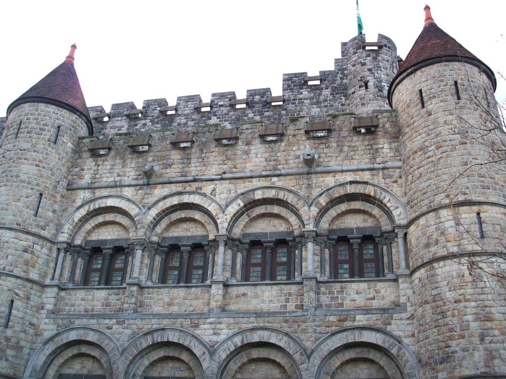 Gravensteen